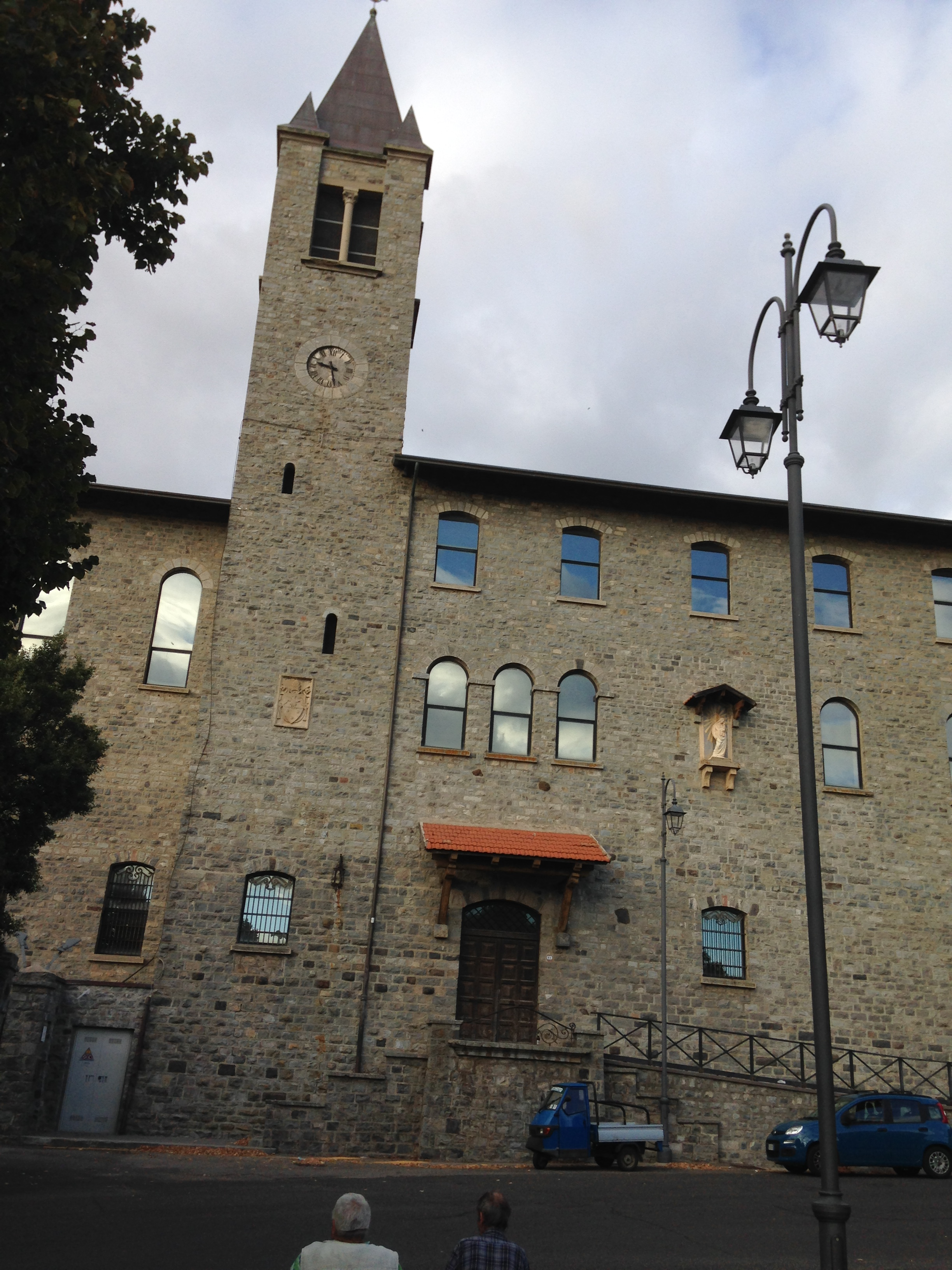 Facciata e campanile dell'edificio